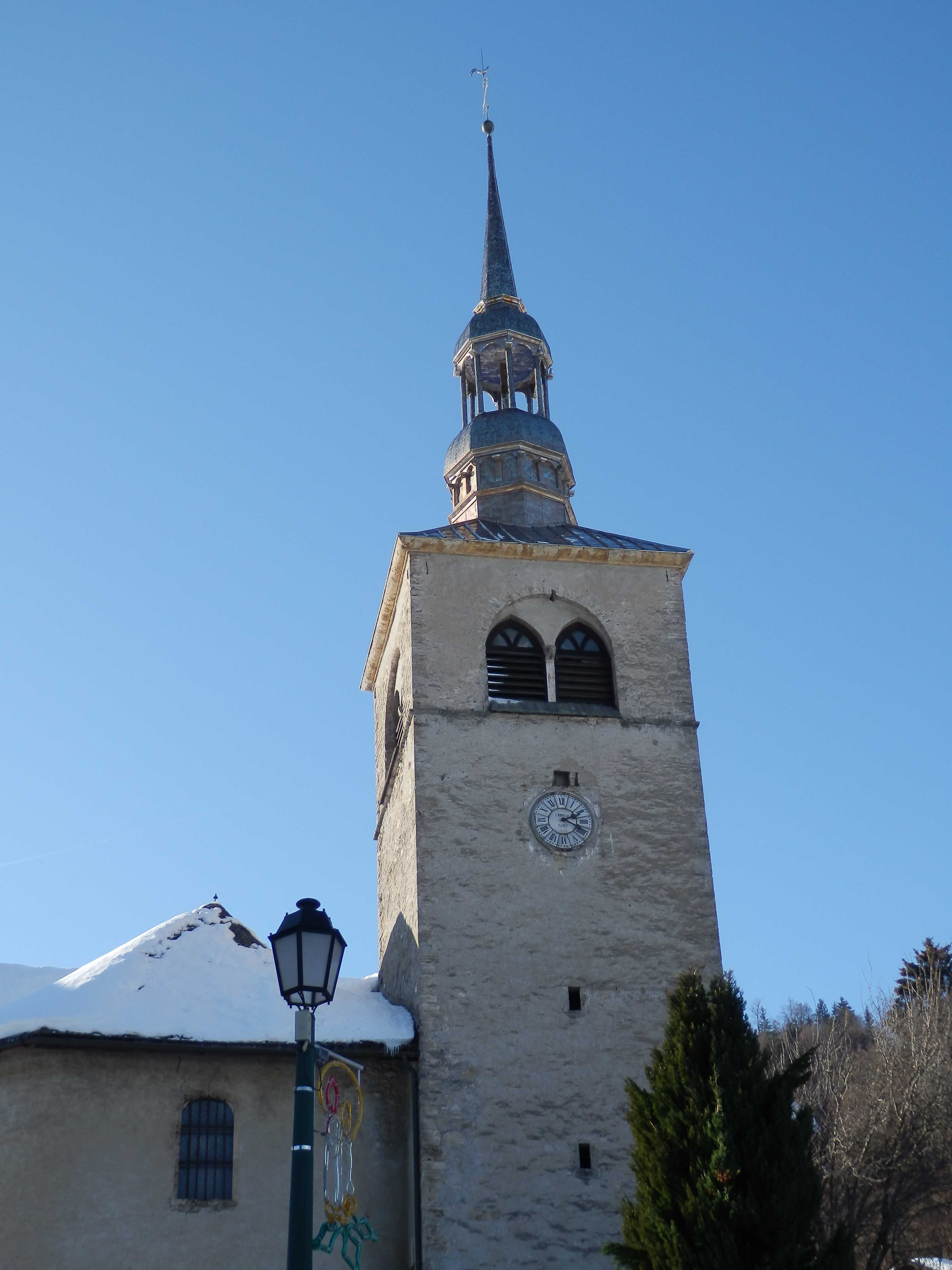 Le clocher de l’église de Saint Nicolas la Chapelle en Savoie.